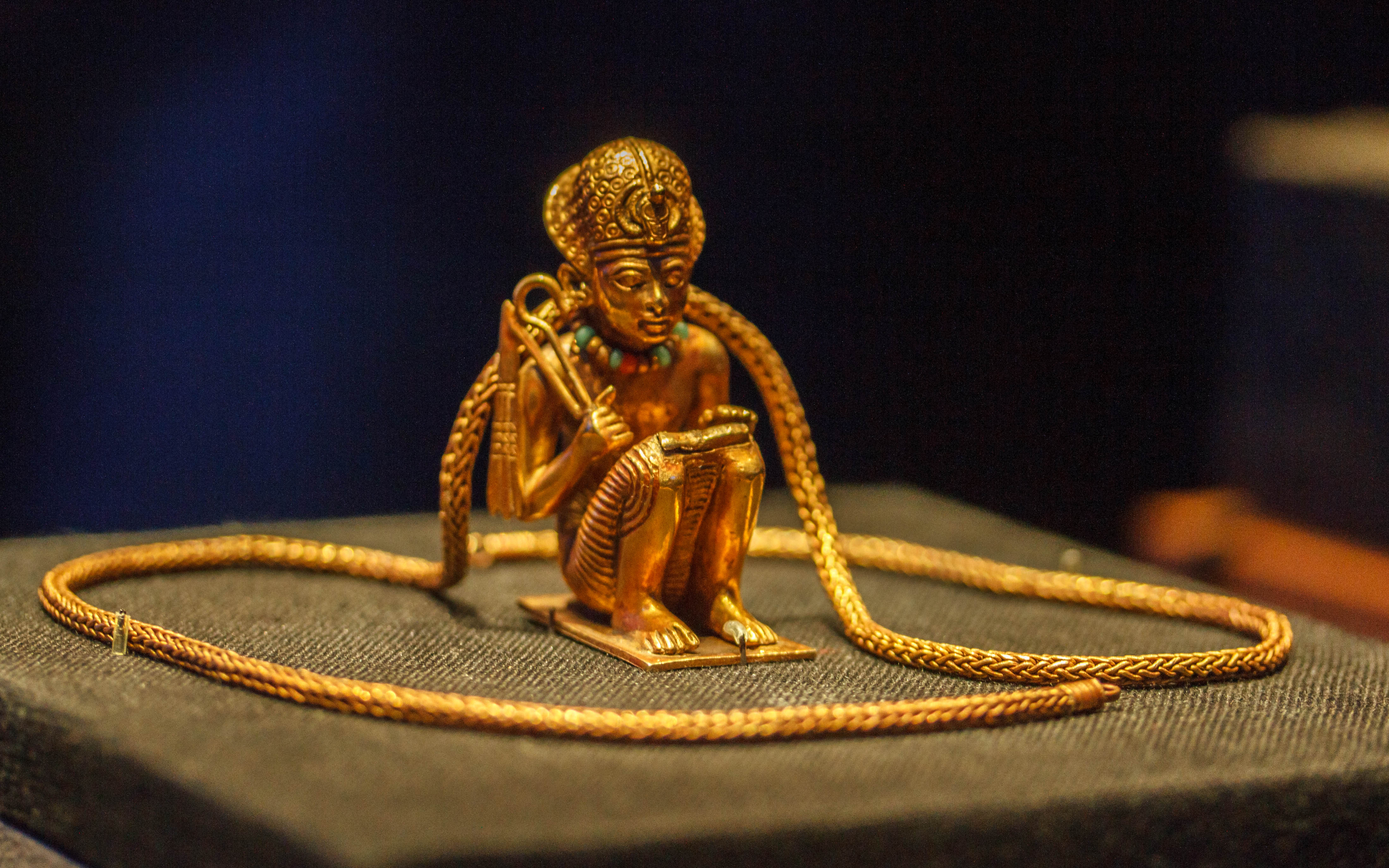 Figurine prosternée, Amenhotep III, GEM 189